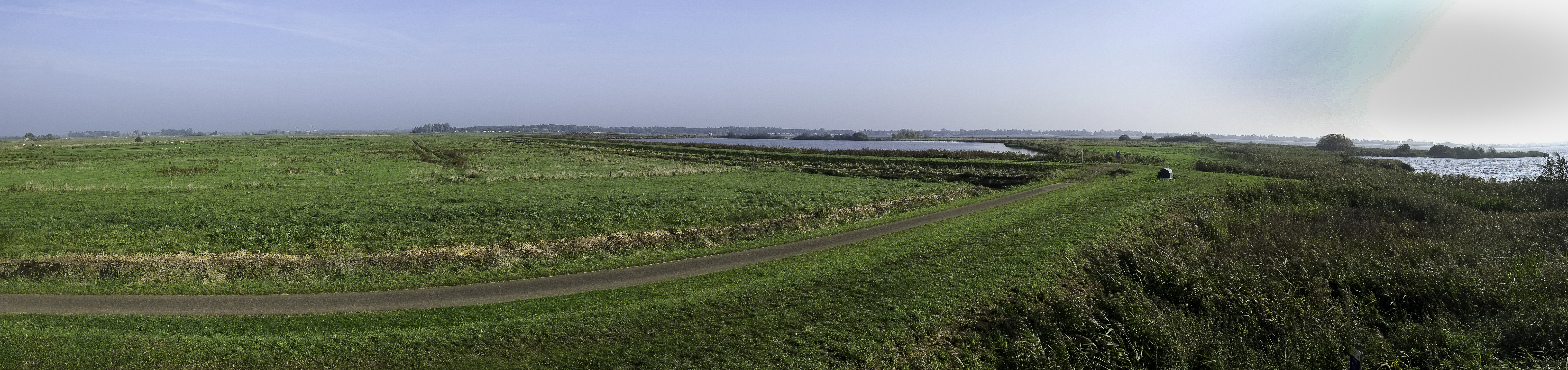 Veenweidegebied in de Oostpolder